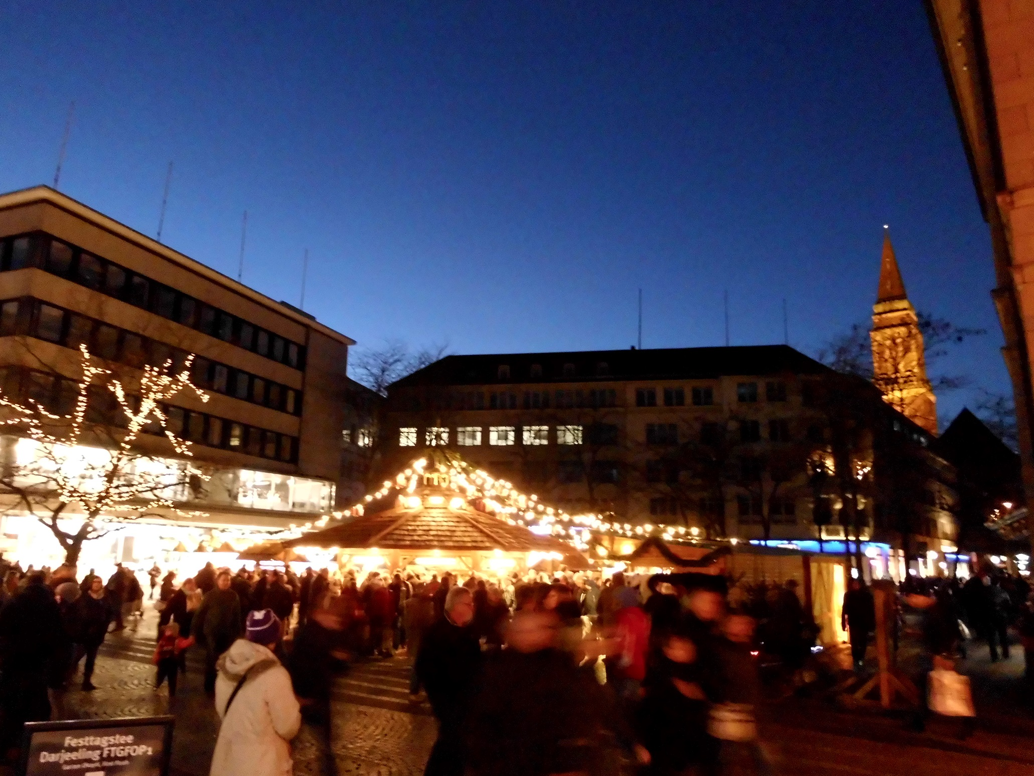 Kieler Weihnachtsmarkt 2014 auf dem Asmus-Bremer-Platz. Rechts im Hintergrund der Kieler Rathausturm.